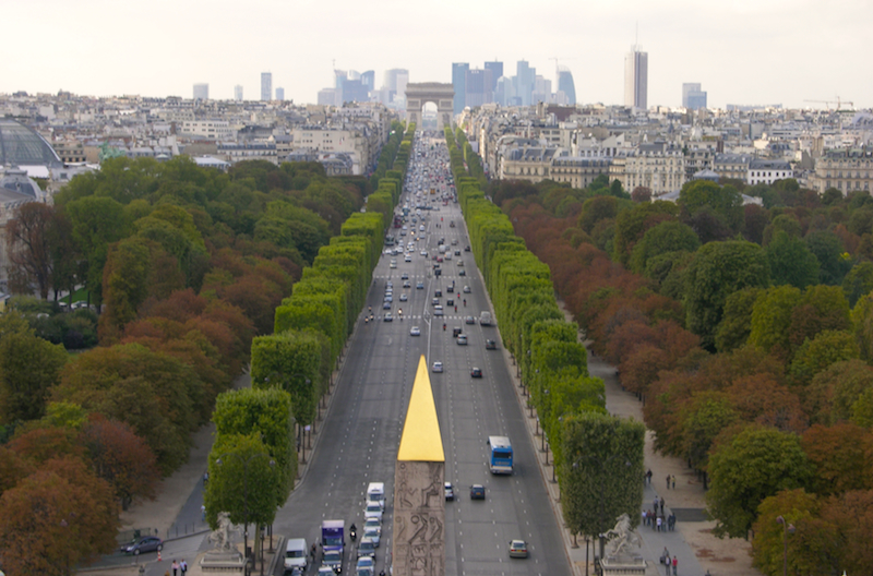 Perspective des Champs-Elysées, de la place de la Concorde à l'Arc de triomphe, vue aérienne prise de la grande roue. Pointe dorée de l'obélisque en premier plan. Les arbres près de l'avenue sont taillés au carré, les arbres dérrière poussent librement.Au loin, les tours du quartier des affaires de la Défense.